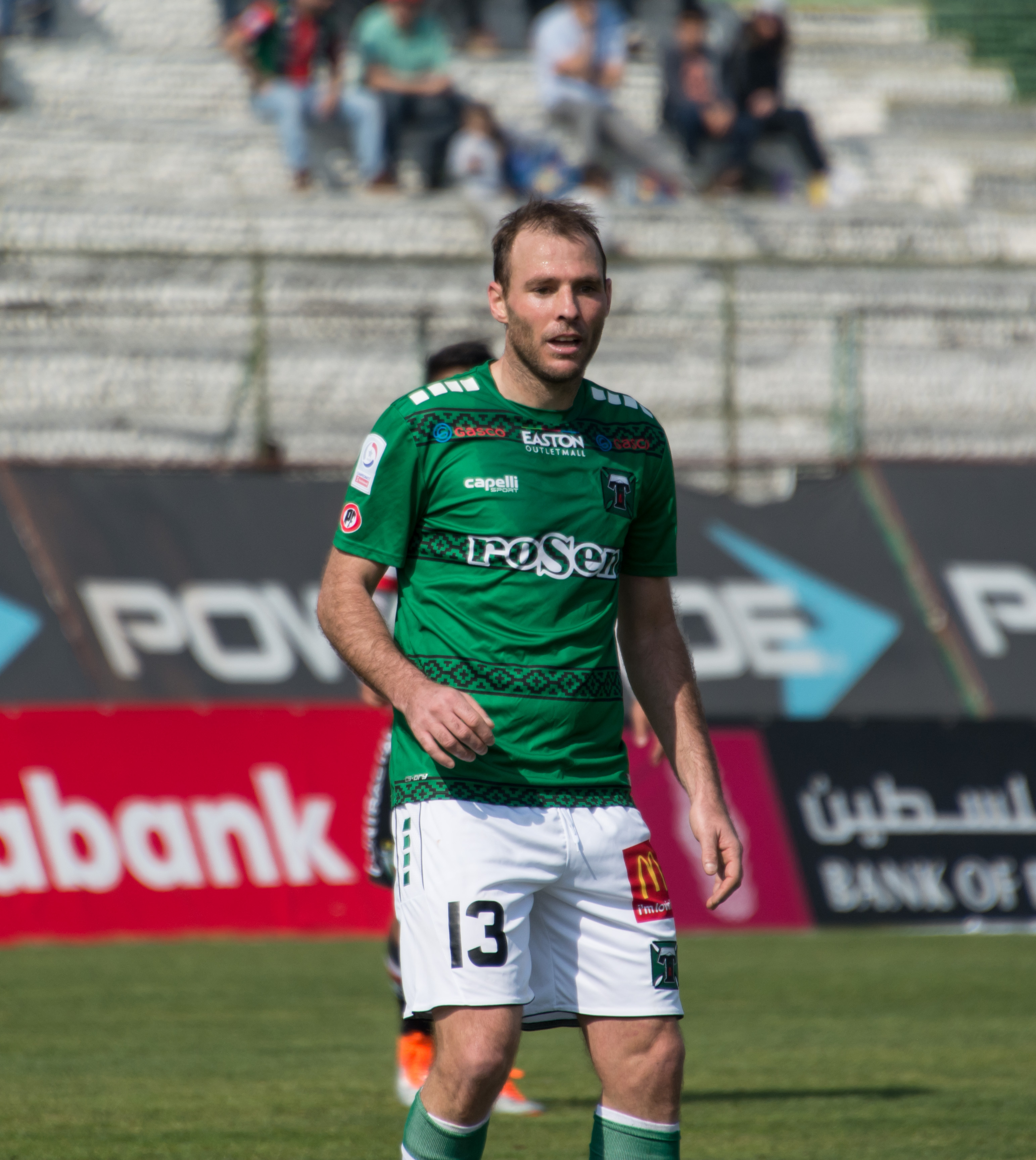 Mathías Riquero, Palestino v Deportes Temuco, Estadio Municipal de La Cisterna, La Cisterna, Santiago, Chile